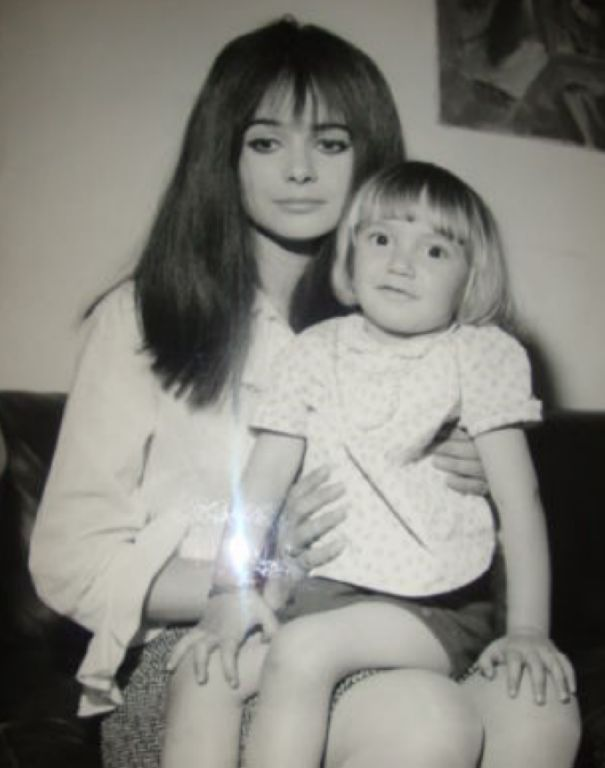 Marisa Solinas con il figlio David nel 1967